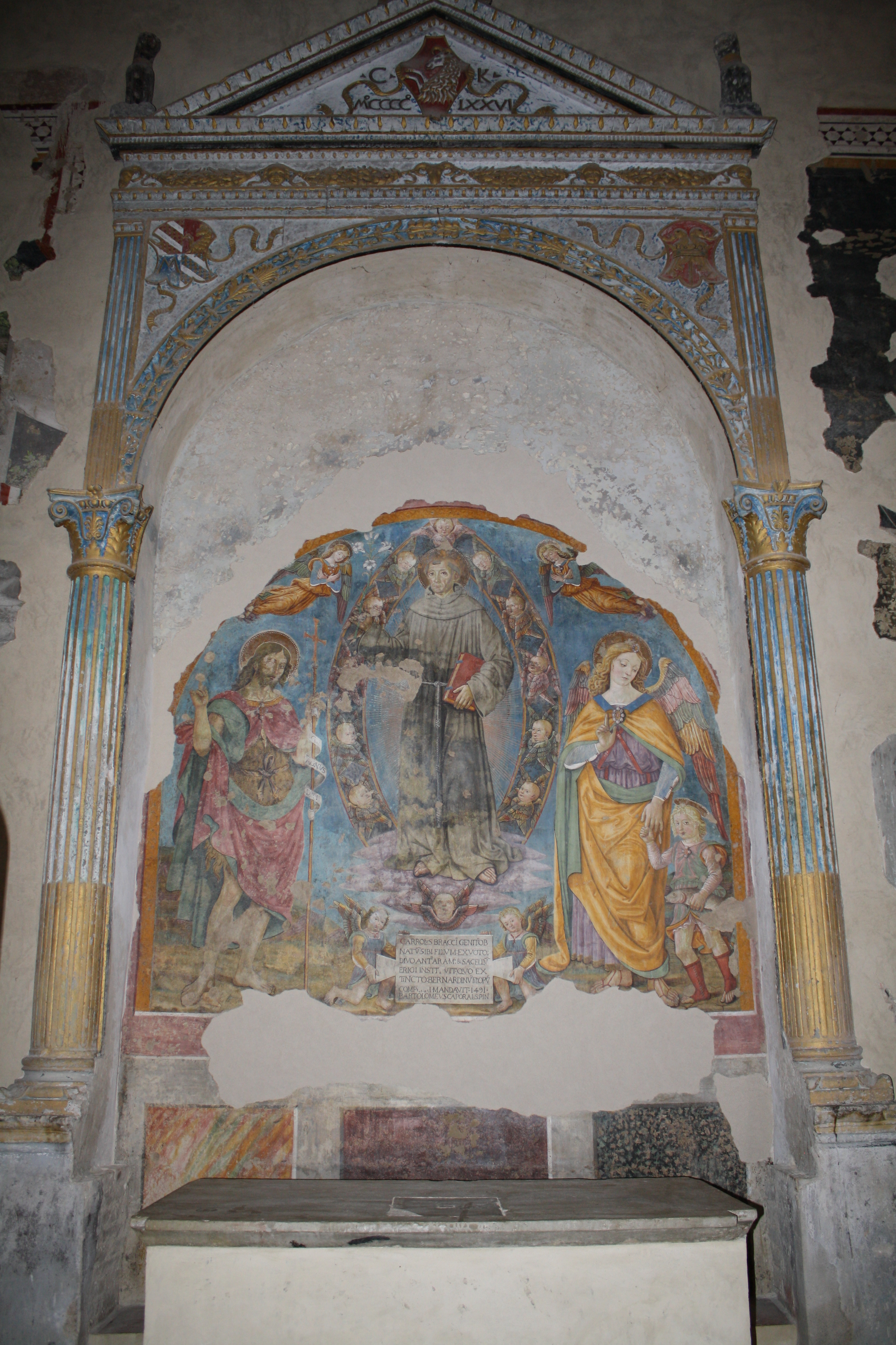 Altare della Famiglia Fortebracci